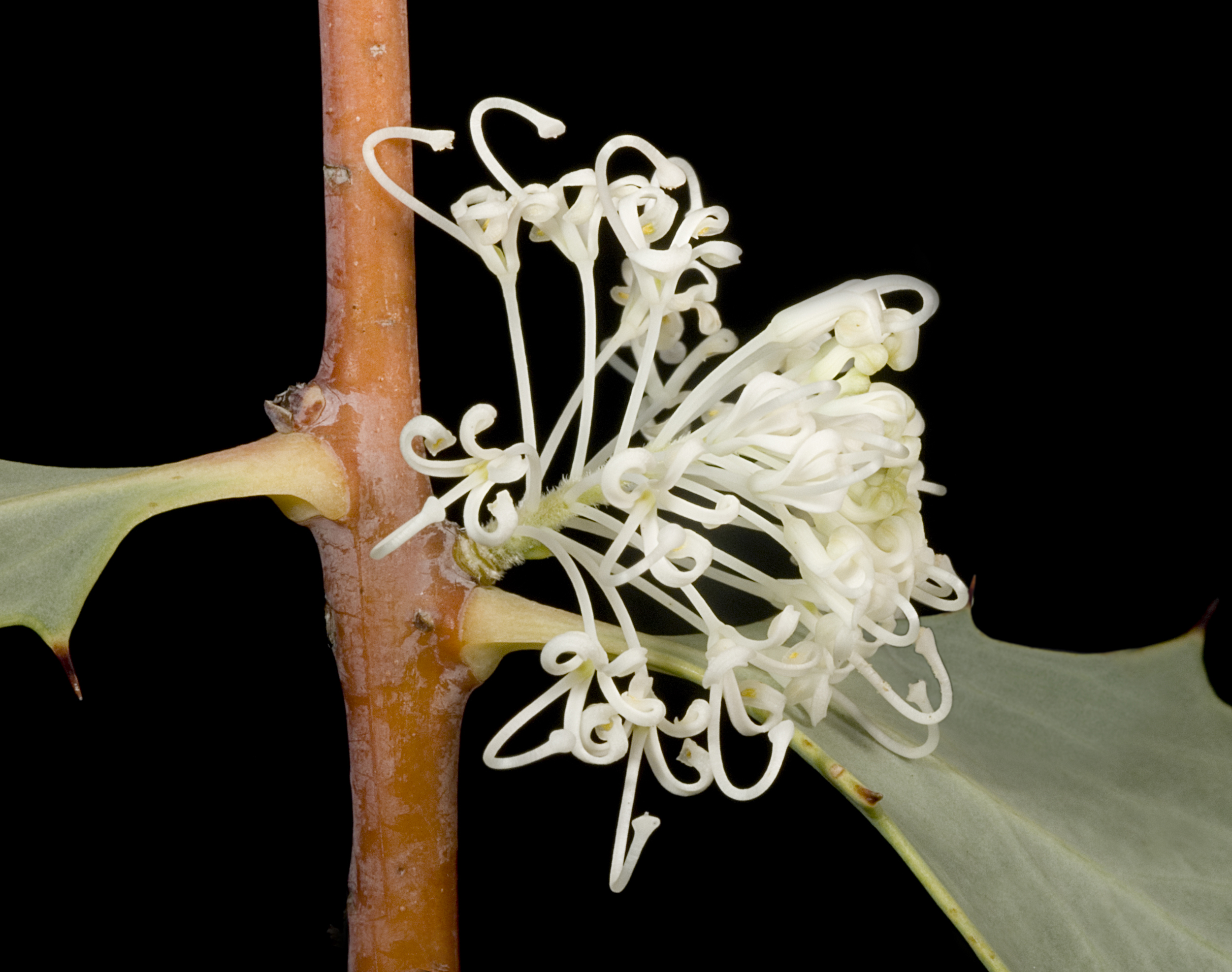 KRT3524